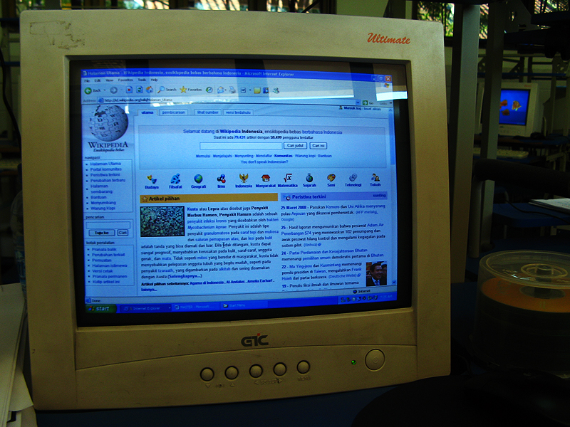 internet wikipedia